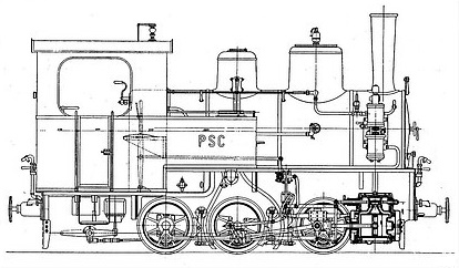 1904 beschaffte die Ponts–Sagne–La Chaux-de-Fonds bei der Schweizerischen Lokomotiv- und Maschinenfabrik (SLM) in Winterthurer zwei E 3/3 mit den Nummern 4 und 5. 1915 wurde eine weitgehende gleiche E 3/3 Nr. 6 nachbeschafft. 1950 kam Nr. 6 –zu den Chemins de fer du Jura (CJ) und erhielt dort die Nummer 9.